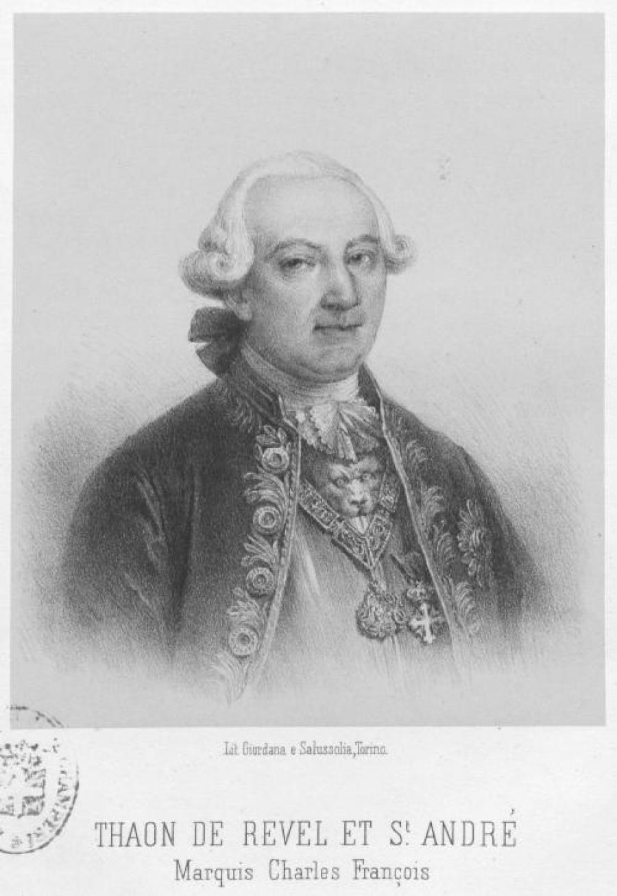 Charles François Thaon comte de Revel et de st andré (1725-1807), vice-roi de Sardaigne, marquis en 1800